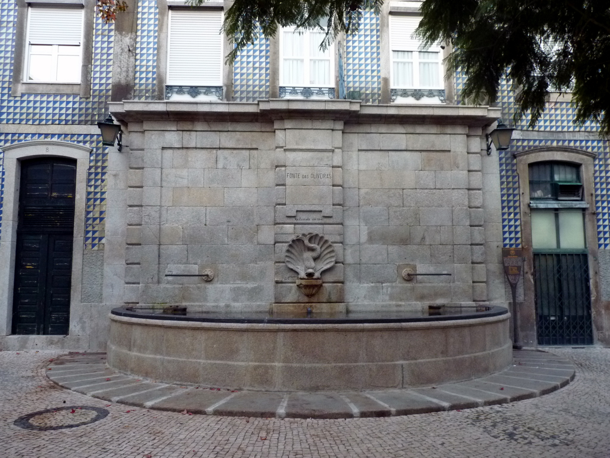 Fonte das Oliveiras, no Lg. de Alberto Pimentel, Cedofeita, Porto, Portugal (N.º IPA PT011312040076)